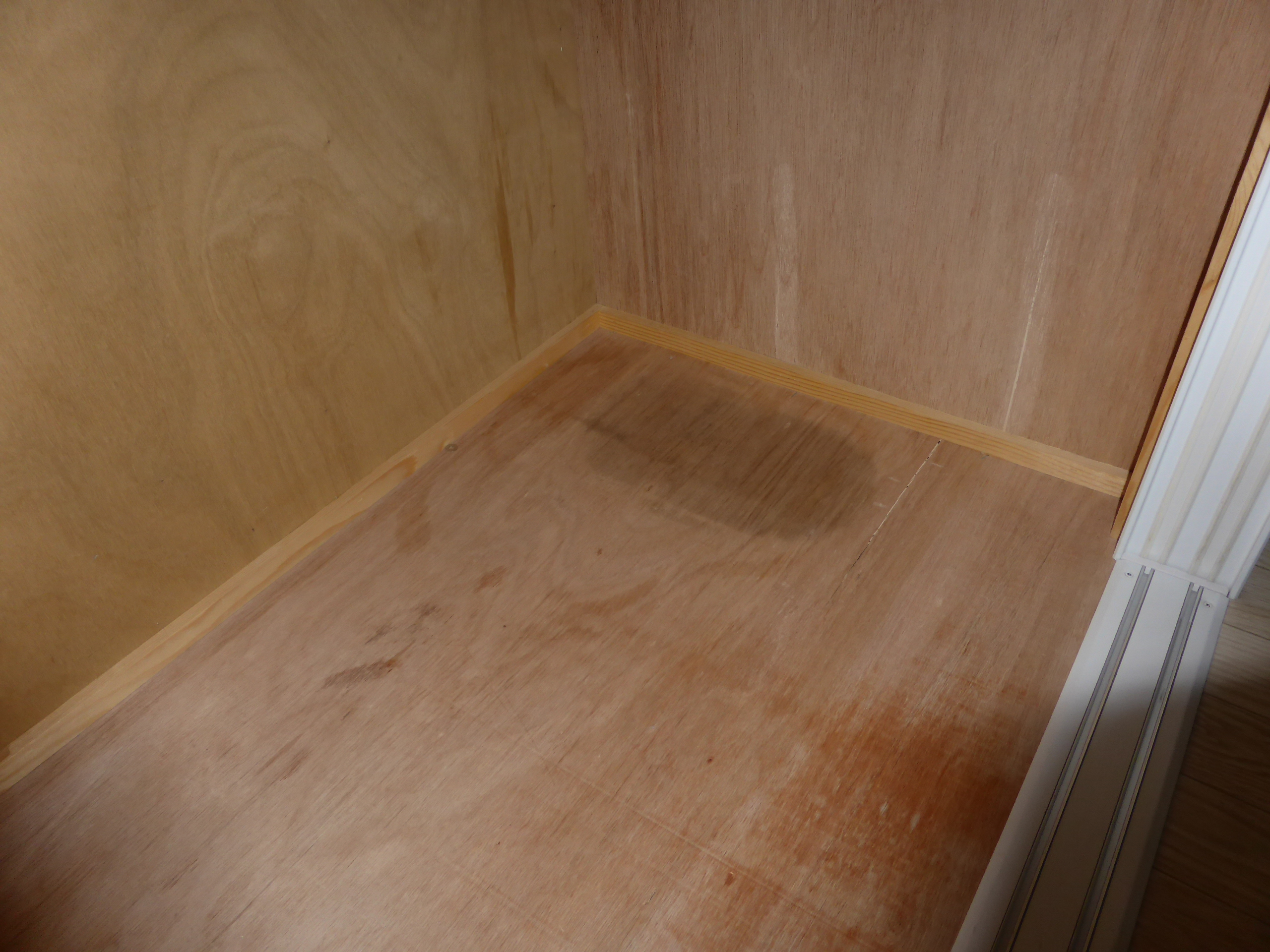 押入れ（クローゼット）の下段。雑巾摺り。